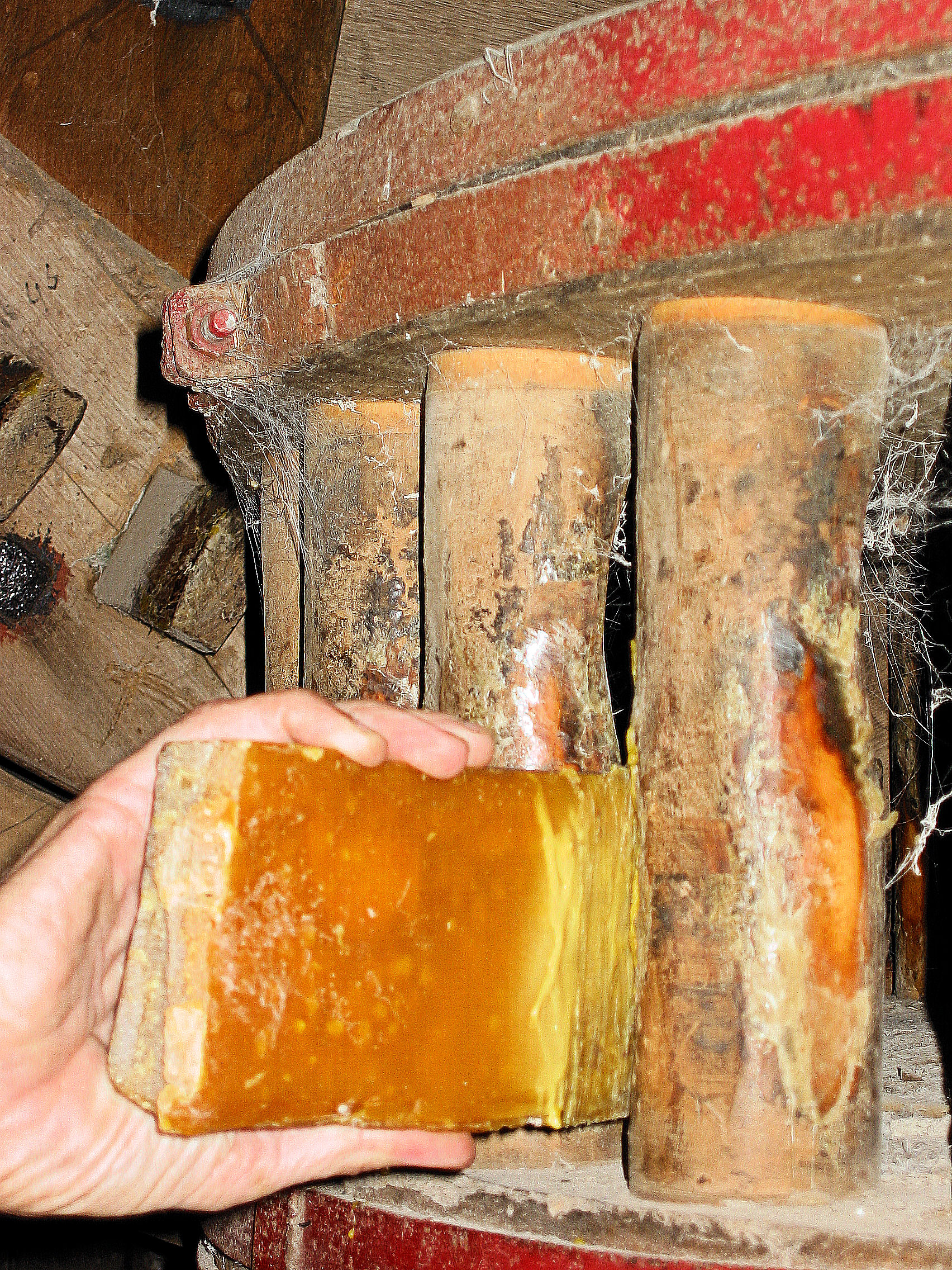 De Hoop in Garderen, staven behandelen met bijenwas, Gelderland, the Netherlands